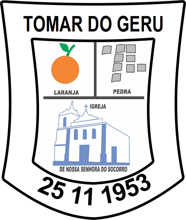 Brasão Municipal de Tomar do Geru